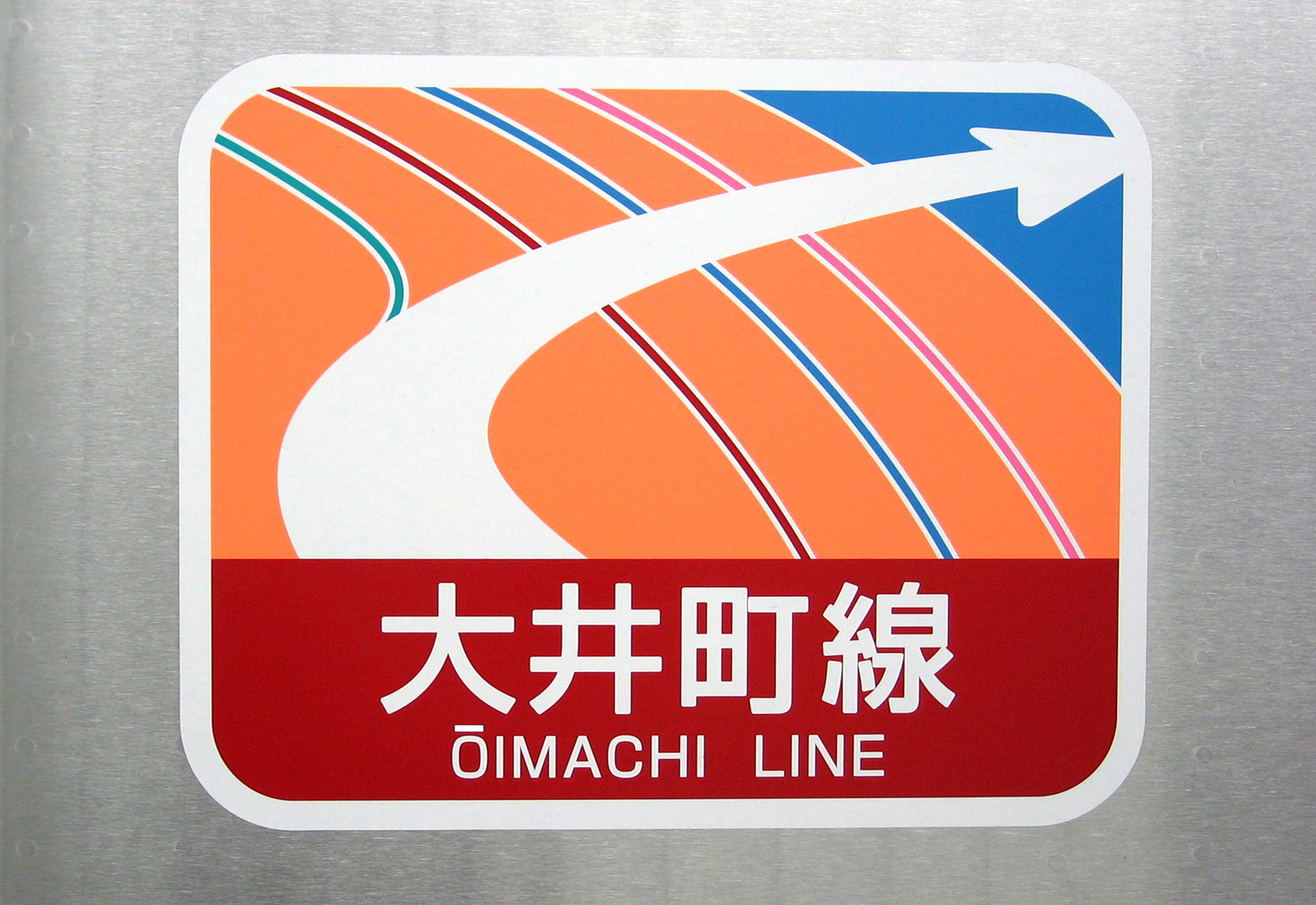 東急8500系(大井町線)・田園都市線直通急行に貼られている誤乗防止用ステッカー(2006年6月10日、中央林間駅にて)